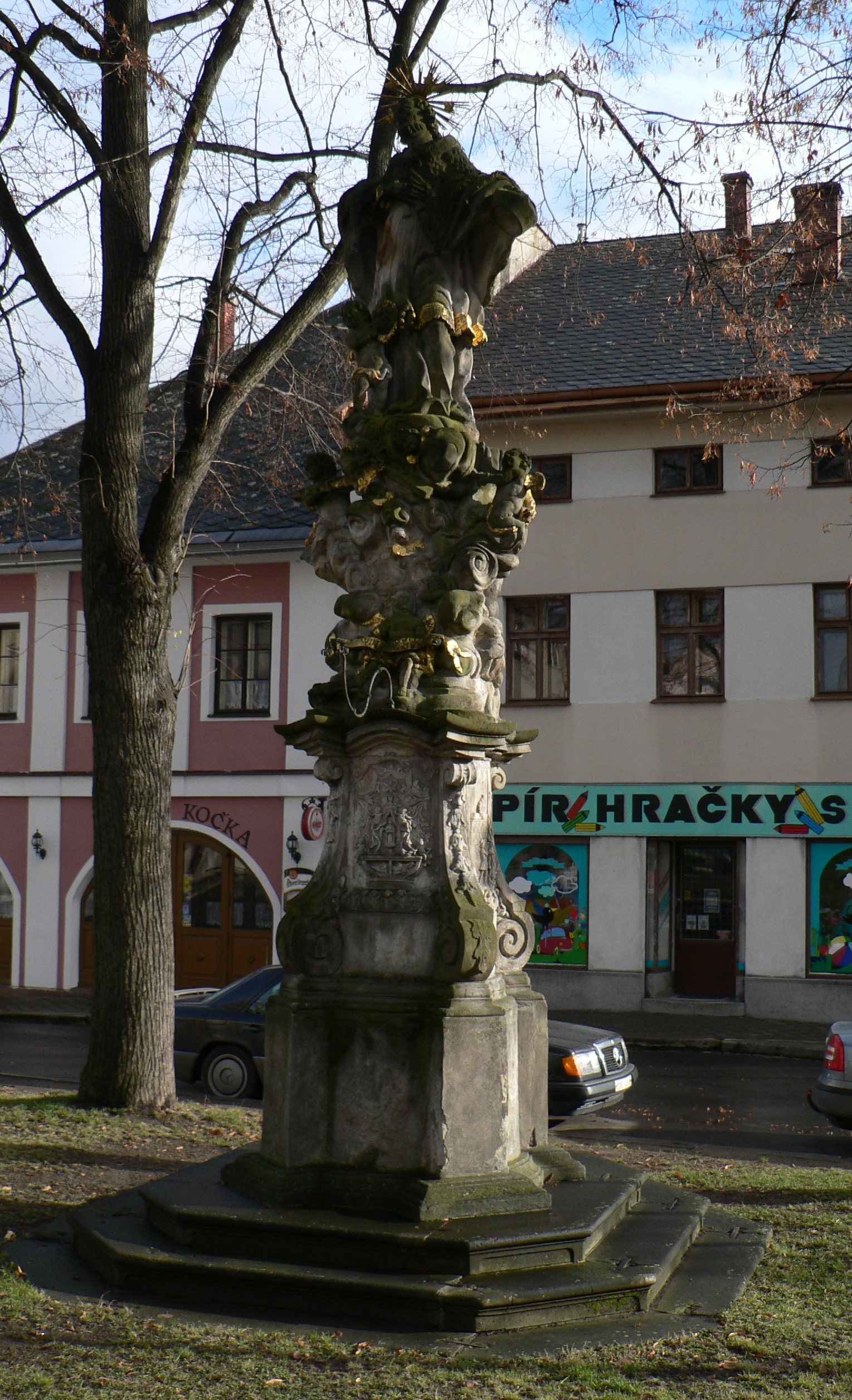 Socha sv. Jana Nepomuckého ve Štítech, vrcholně barokní práce z roku 1732.